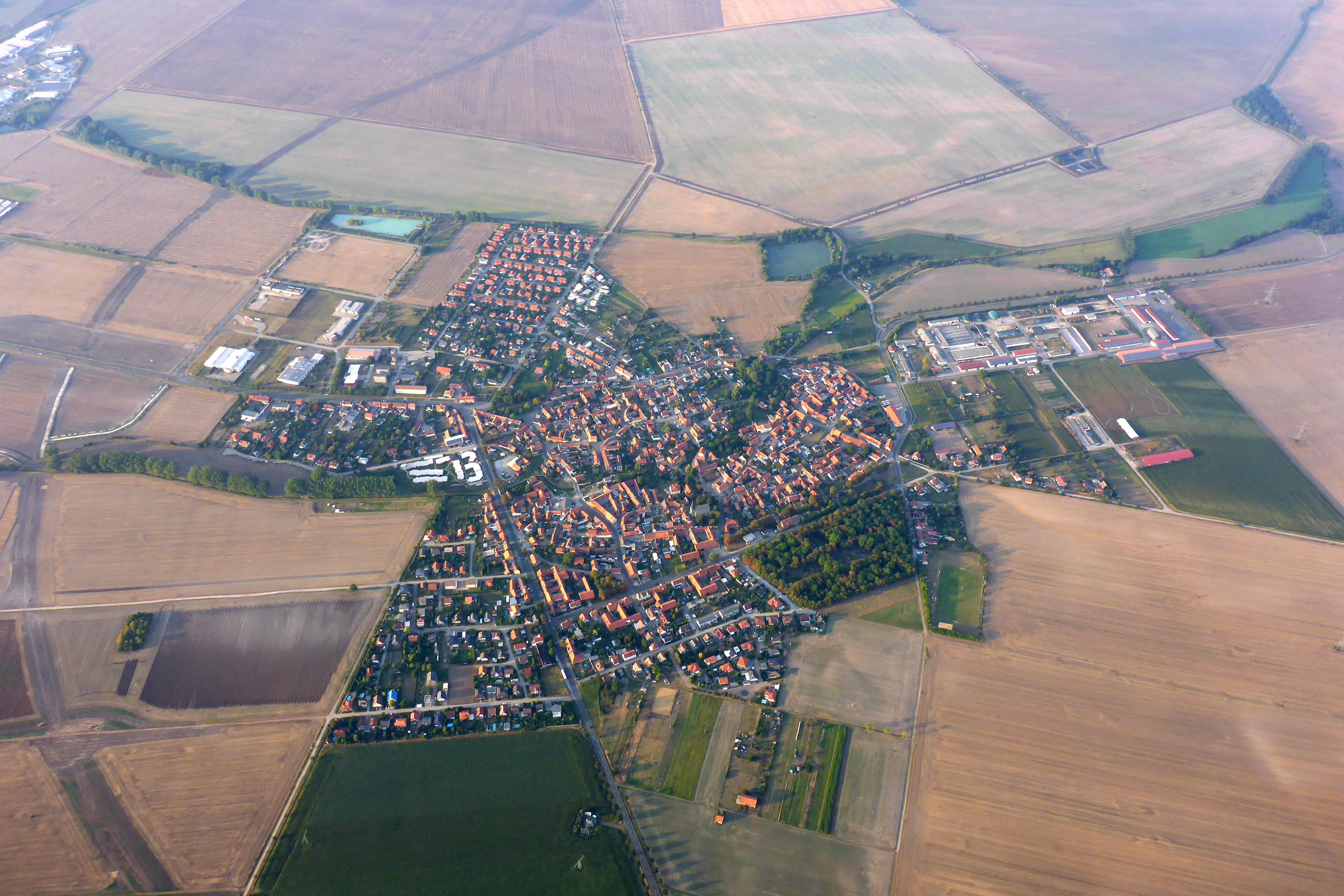 Harsleben bei Halberstadt aus etwa 1000m Höhe, links am Bildrand erkennt man den Verlauf der im Bau befindlichen Ortsumgehung B79-B81.